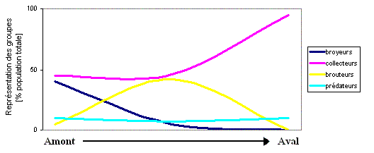 Distribution des groupes d'invertébrés de l'amont vers l'aval d'un cours d'eau dans le modèle du continuum fluvial